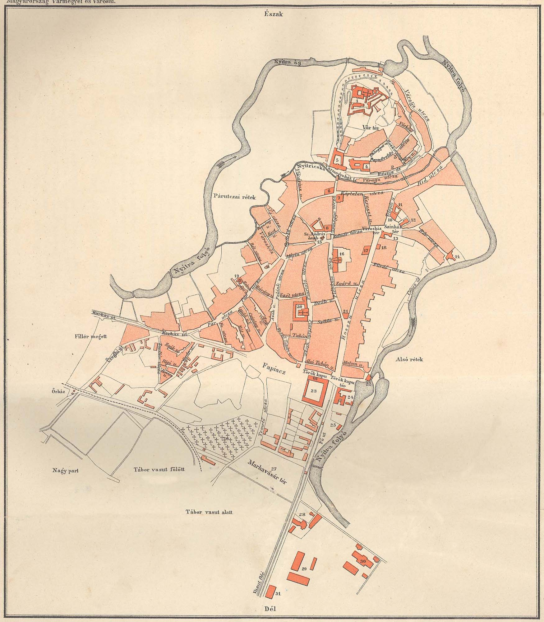 Nyitra,térkép,1899, Borovszky szerint